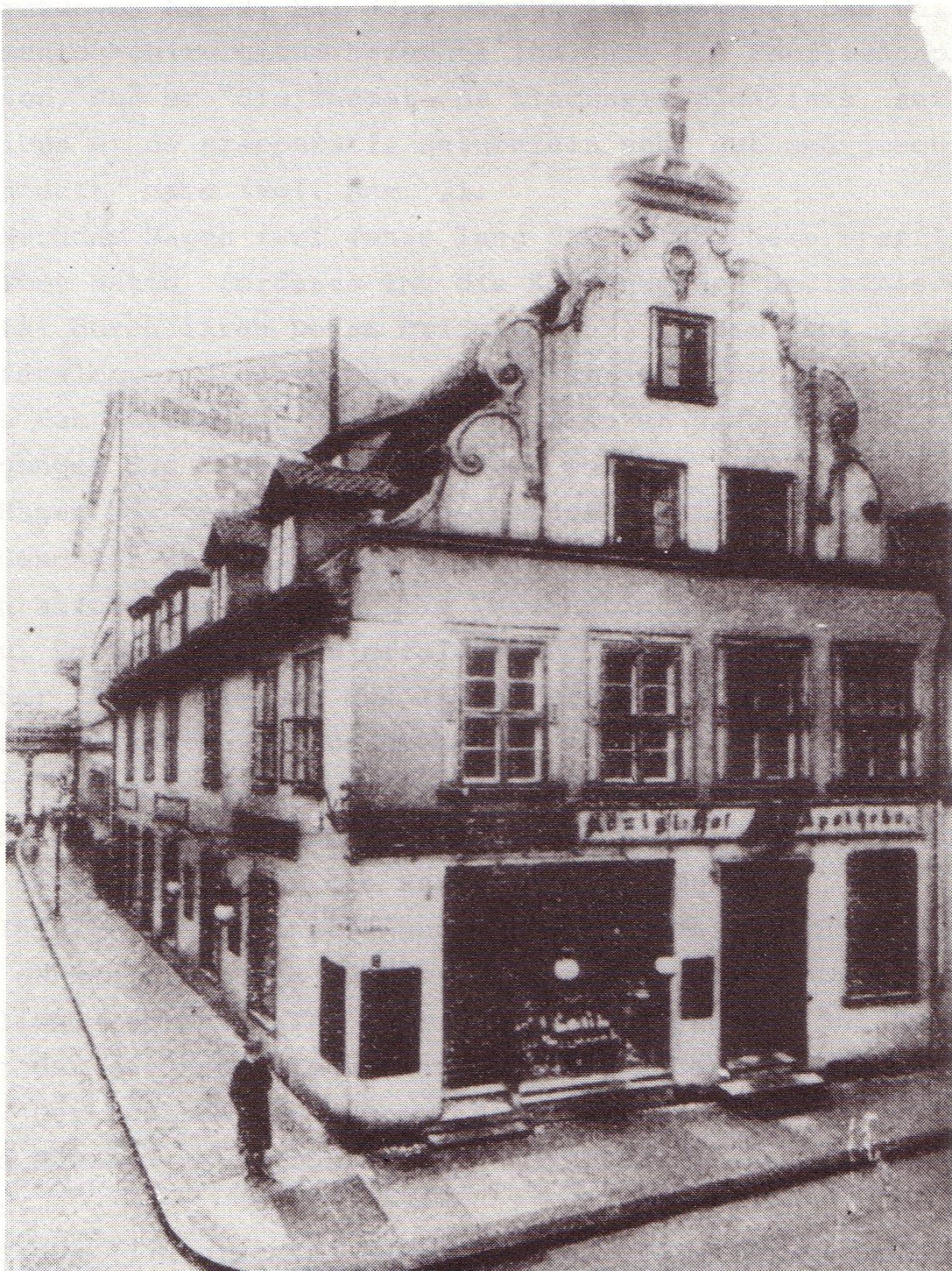 Fotografie von Hagens Hof-Apotheke, Junkerstraße 6, Königsberg i. Pr., 1913 abgerissen